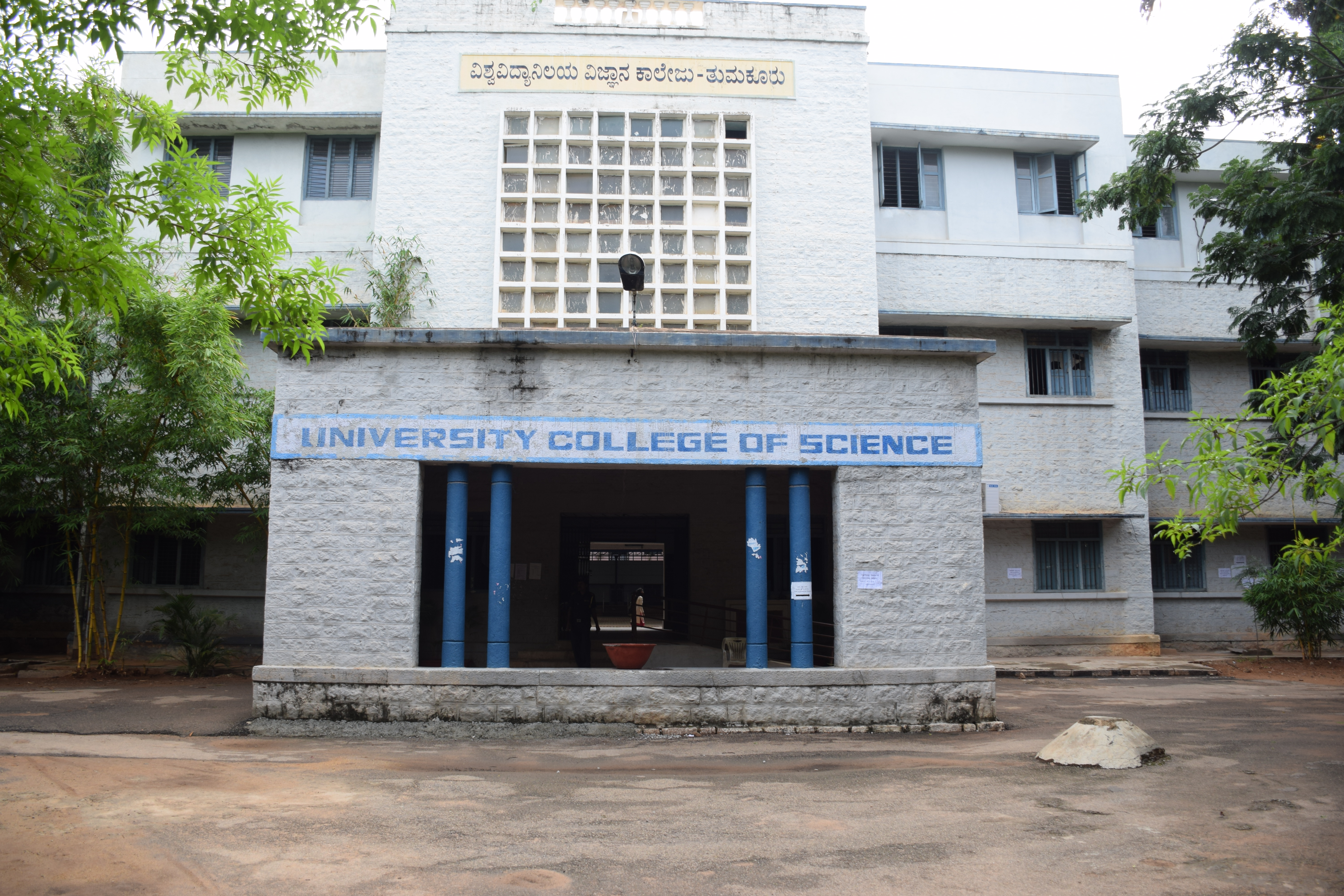 ಕನ್ನಡ: ತುಮಕೂರು ವಿಶ್ವವಿದ್ಯಾನಿಲಯದ ವಿಜ್ಙಾನ ವಿಭಾಗ